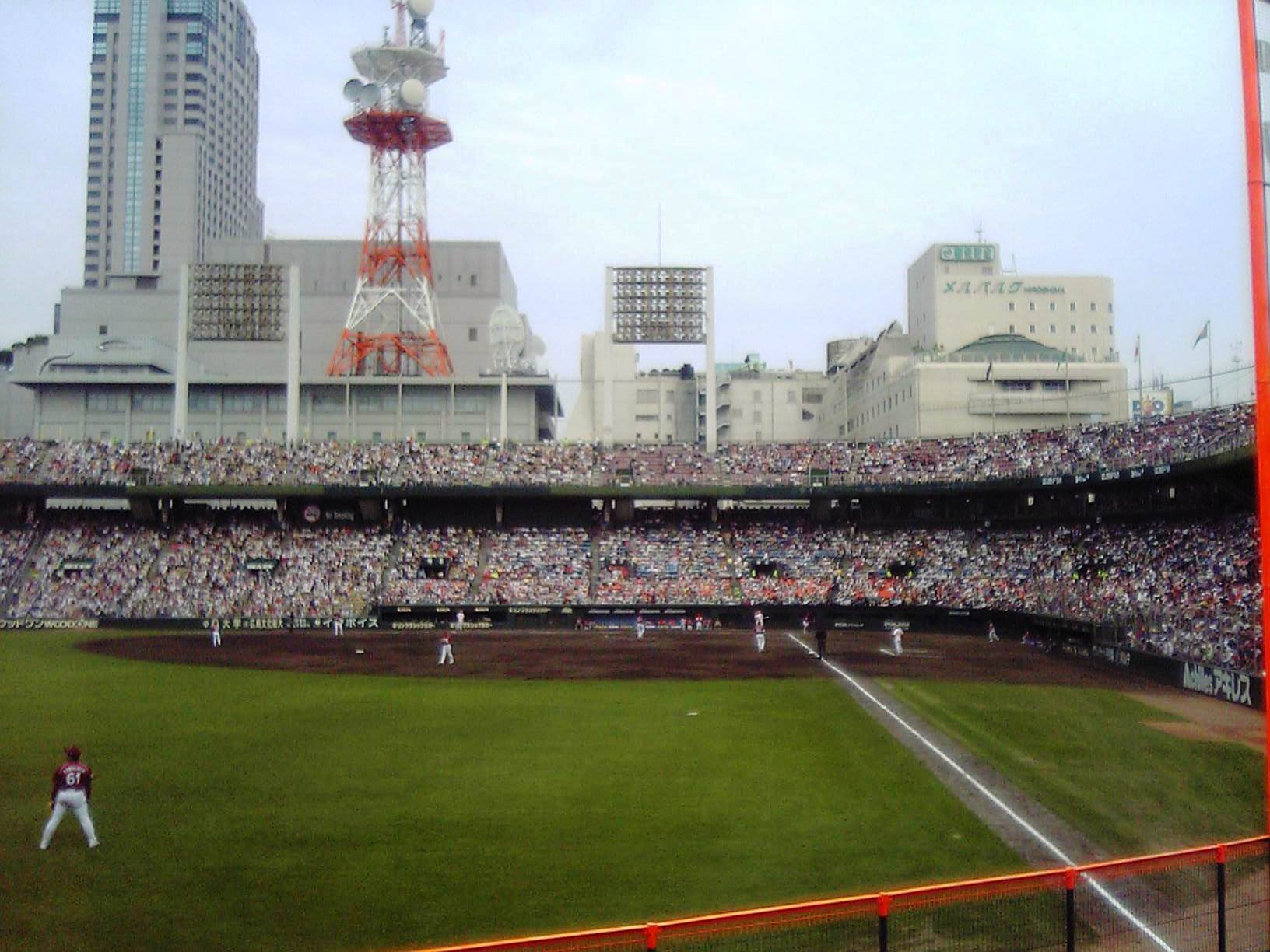 2005年5月21日、本人撮影 広島市民球場、広島－楽天 交流戦 2005年5月23日 (月) 20:25 . . Taisyo . . 680×510 (64,643 バイト)